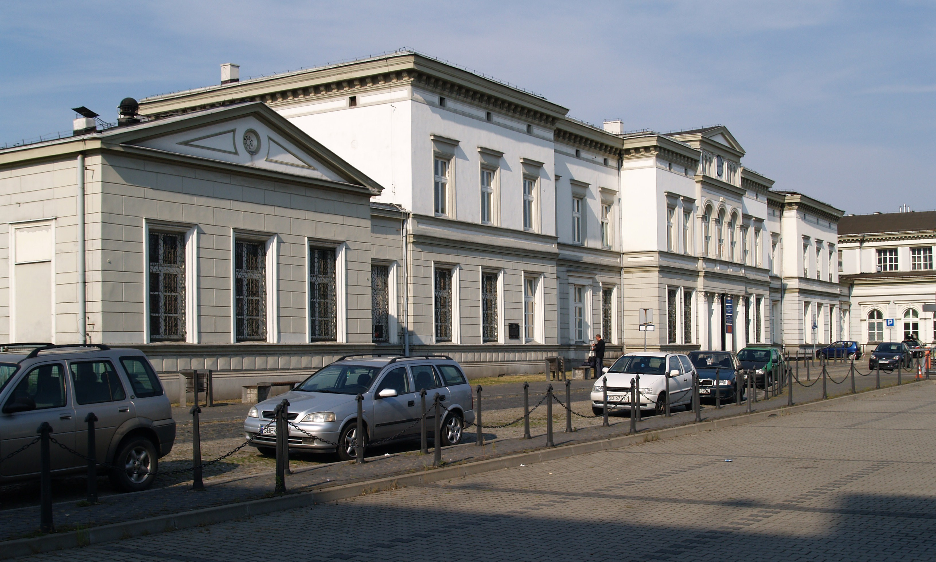 Sosnowiec. Dworzec Główny PKP.